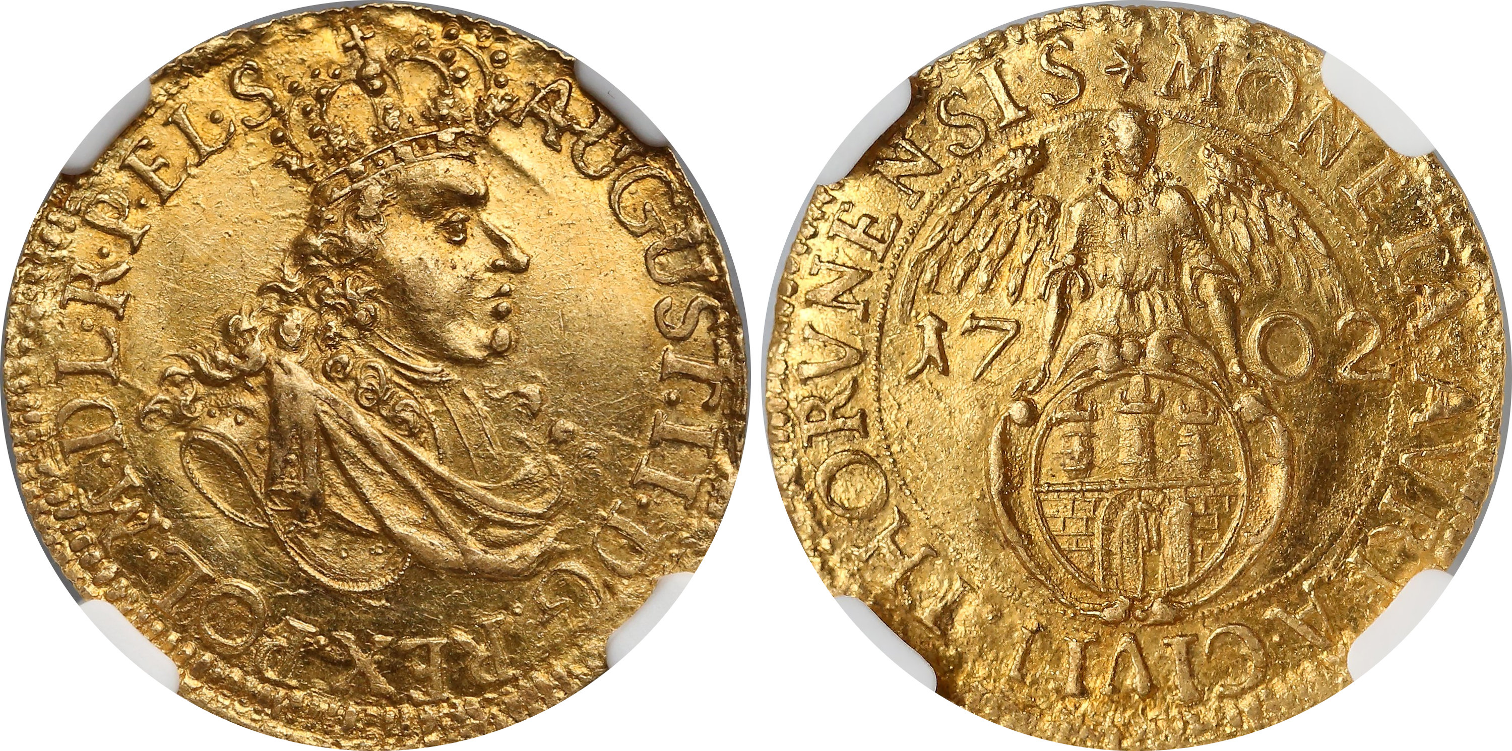 Dukat miejski Toruń 1702